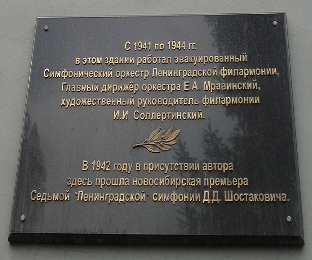 Мемориальная доска Симфоническому оркестру Ленинградской филармонии